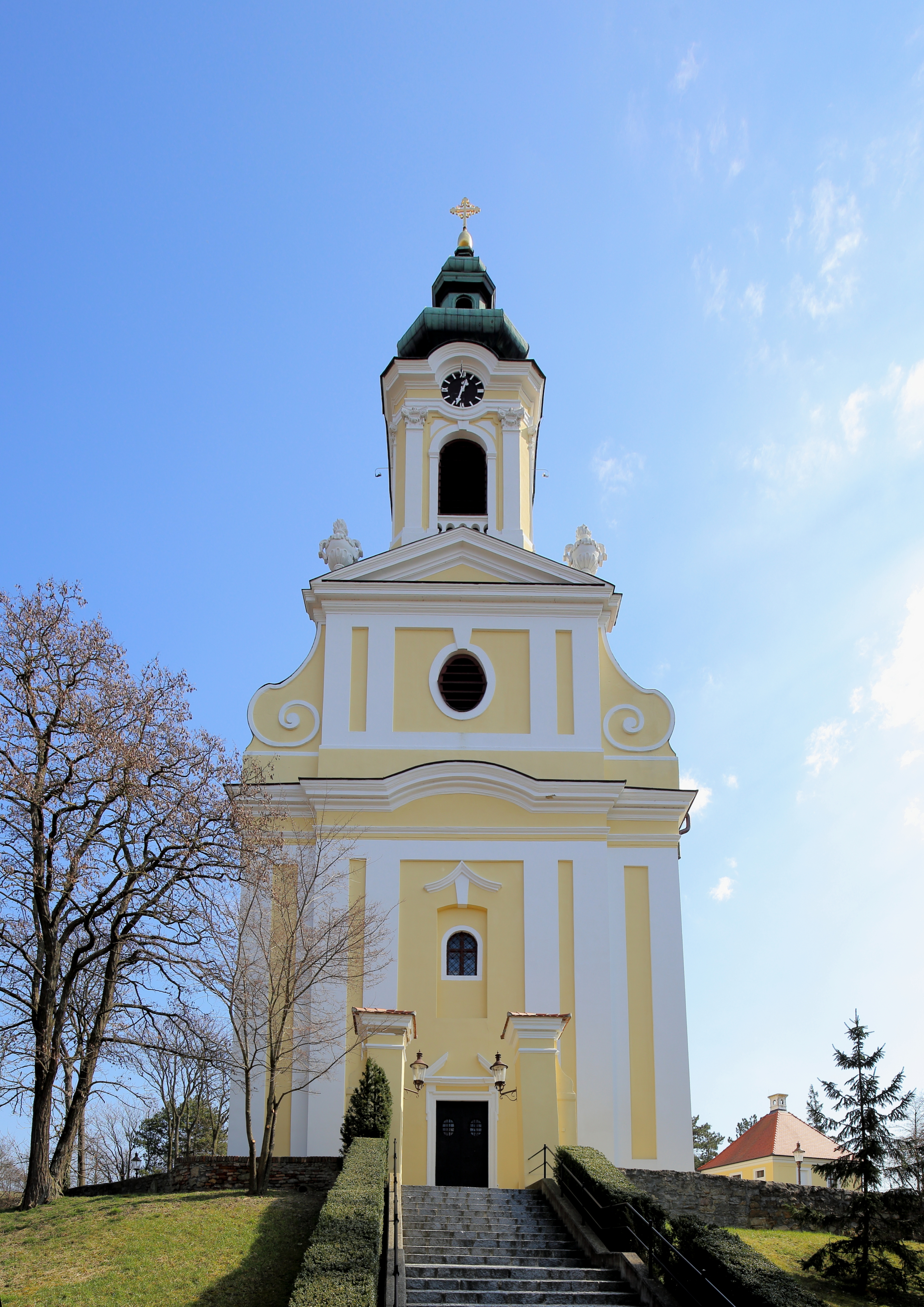 Die viergeschossige Turmfassade (Westansicht) der katholischen Pfarrkirche hll. Barbara und Agatha in der niederösterreichischen Marktgemeinde Bad Pirawarth. Ein anstelle einer mittelalterlichen Wehrkirche auf dem Hausberg errichter barocker Sakralbau, der teilweise noch von der ursprünglichen Wehrmauer umgeben ist.